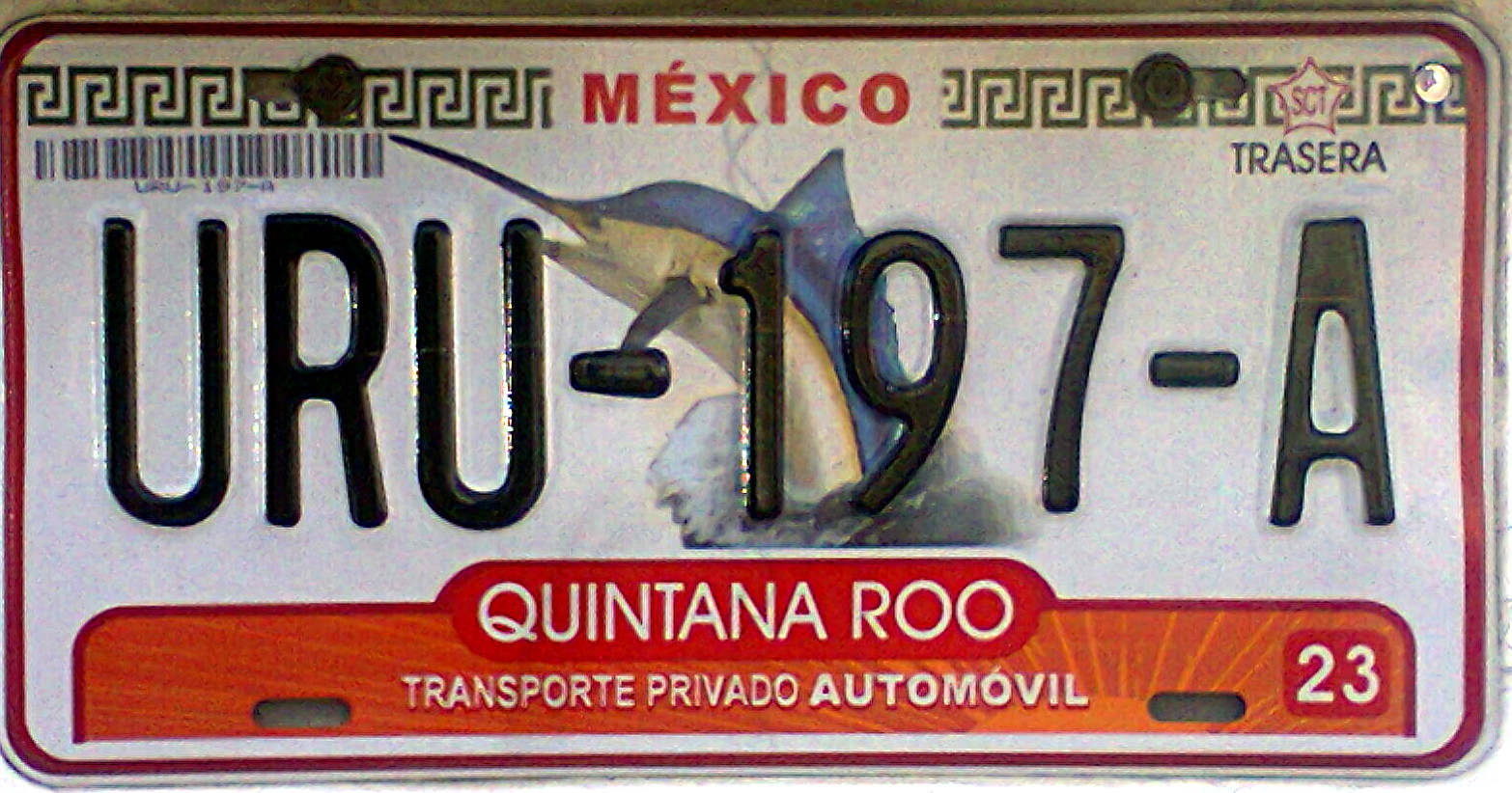 Nueva denominación de matriculas en Quintana Roo